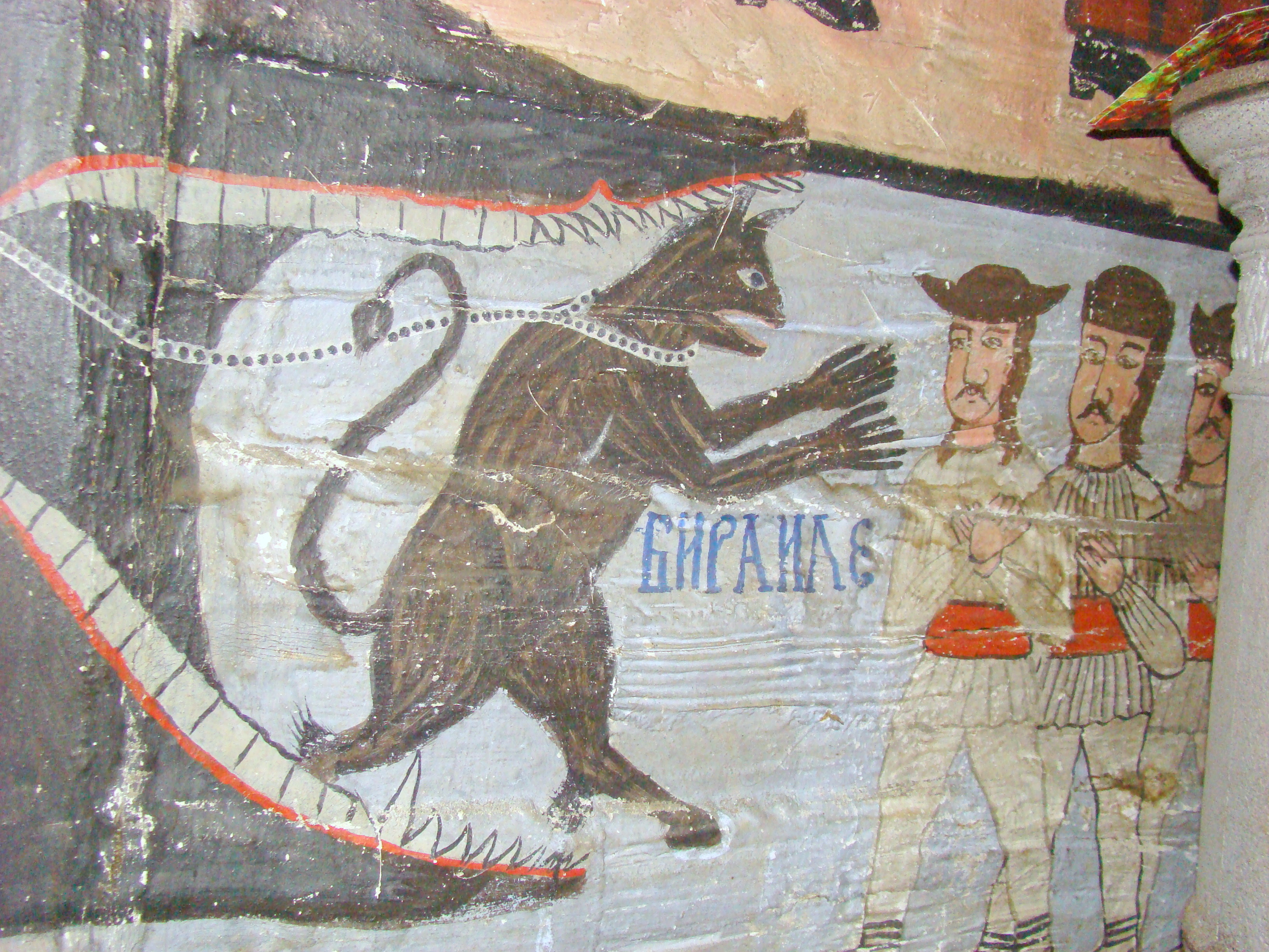 Biserica de lemn „Sfinții Arhangheli” din Ocolișel, județul Cluj